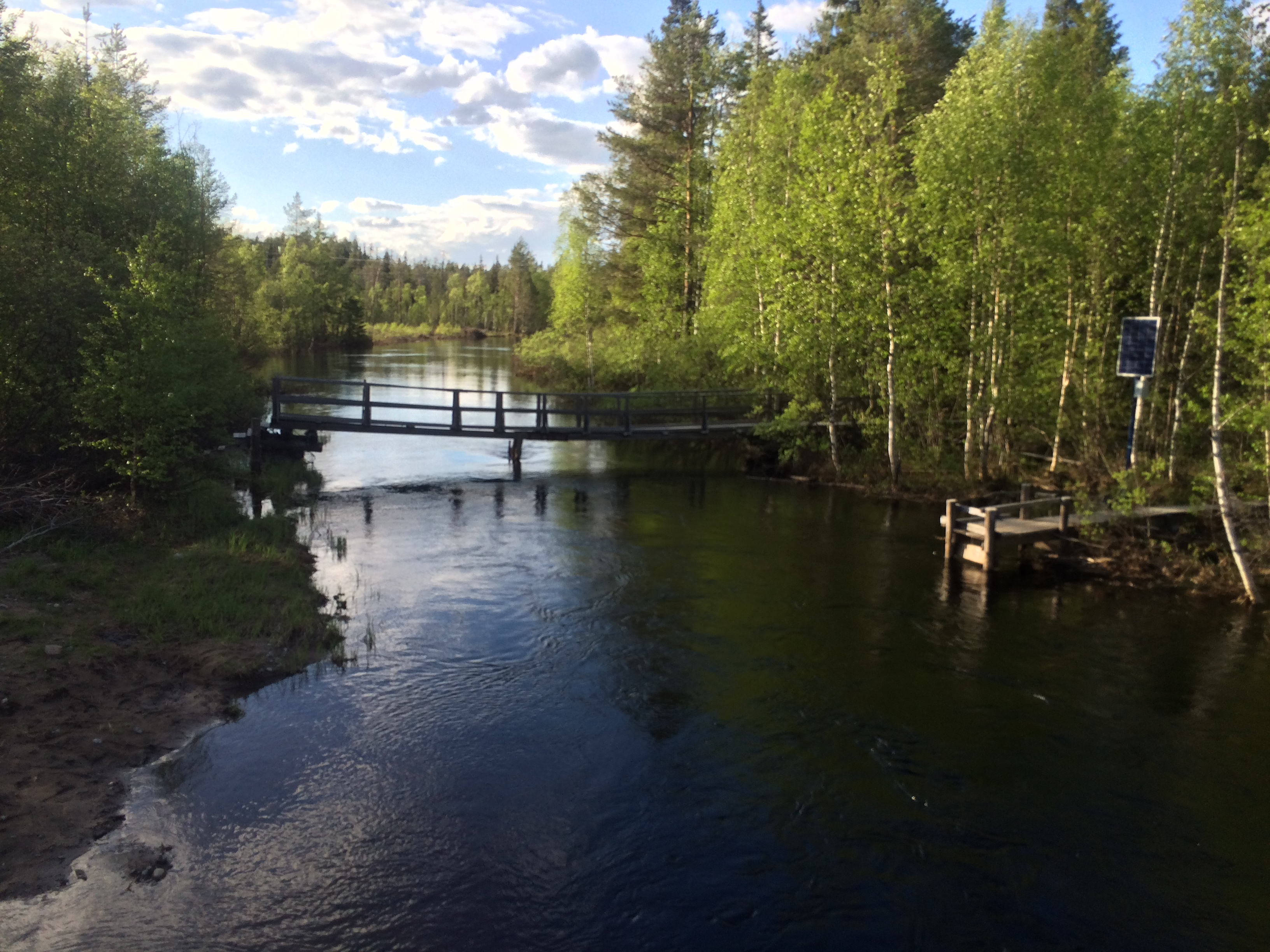 река Манинка